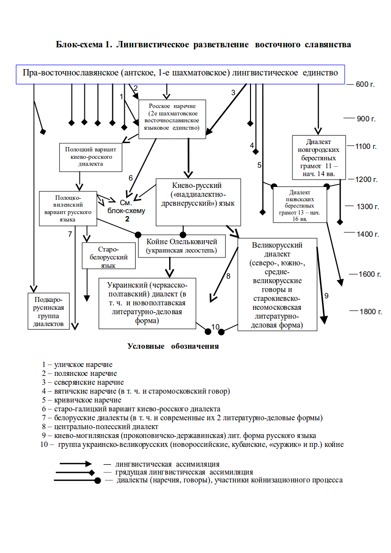 Блок-схема для статьи "Древнекиевский диалект"